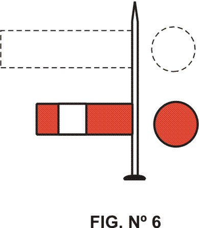 Es una foto de una señal ferroviarria argentina, la señal de llamada (la pequeña de abajo).